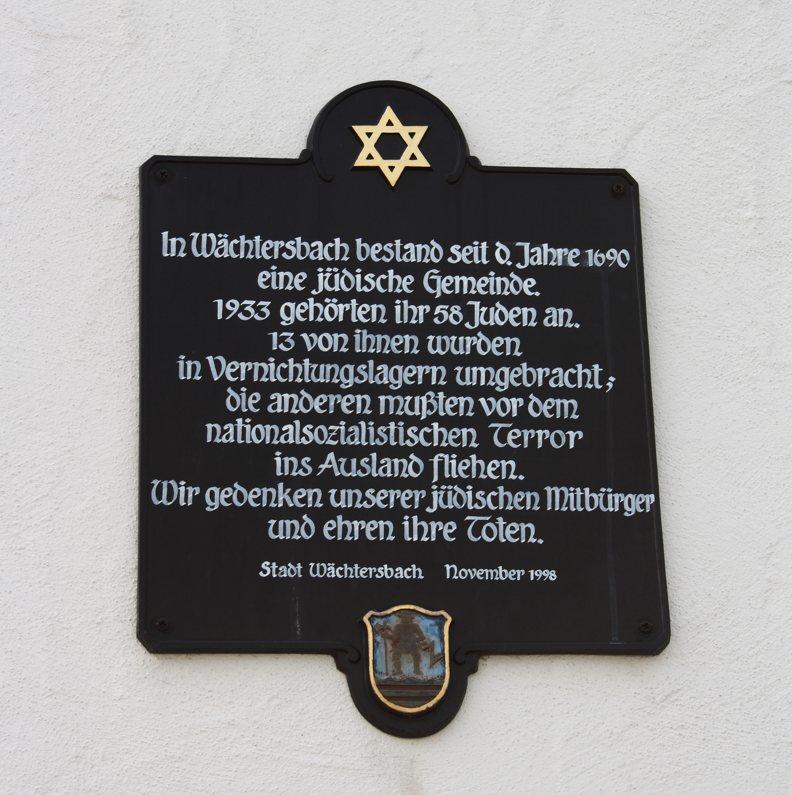 ehemalige Synagoge in Wächtersbach im Main-Kinzig-Kreis (Hessen), Bleichgartenstraße 6